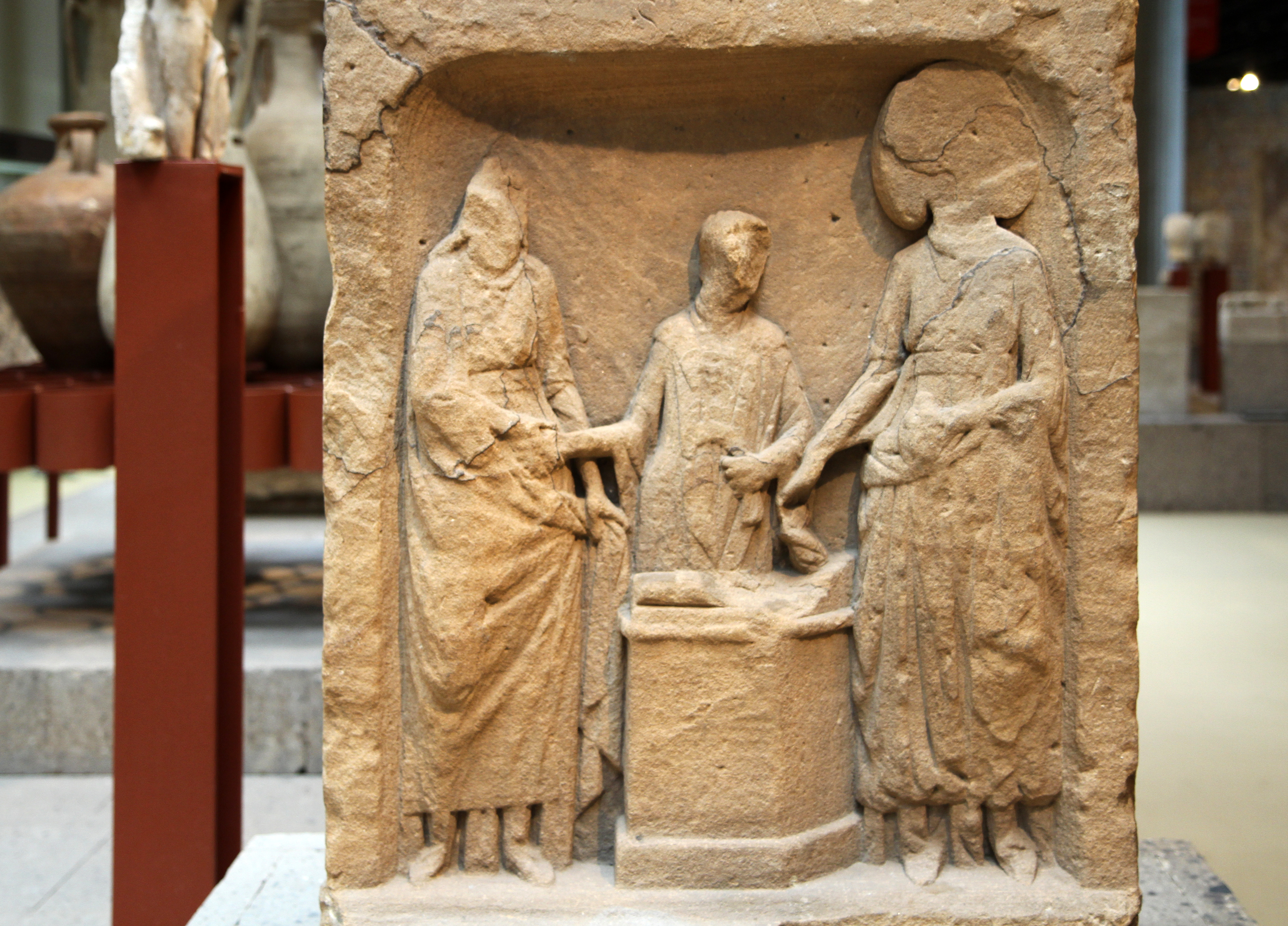 Bornheim Sechtem, Weiherelief für den Gott Mercur vom Anfang des 3. Jh. n. Christus. Fundort Sechtem, Ausstellungsort Köln (RGM Köln, CIL XIII 008234)